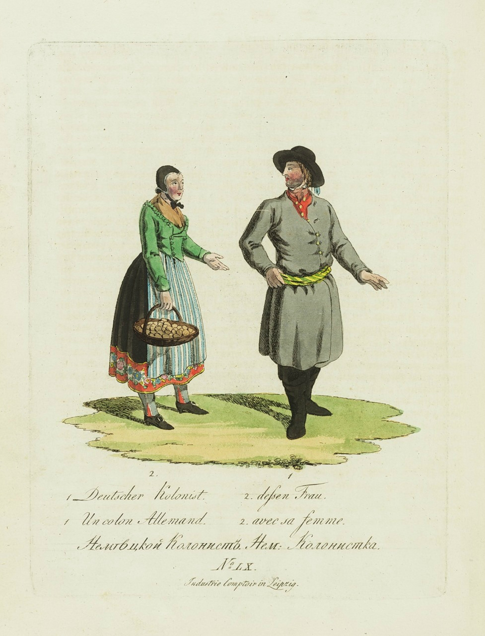 Немецкий колонист и немецкая колонистка в России. Беларуская (тарашкевіца): Нямецкія каляністы.